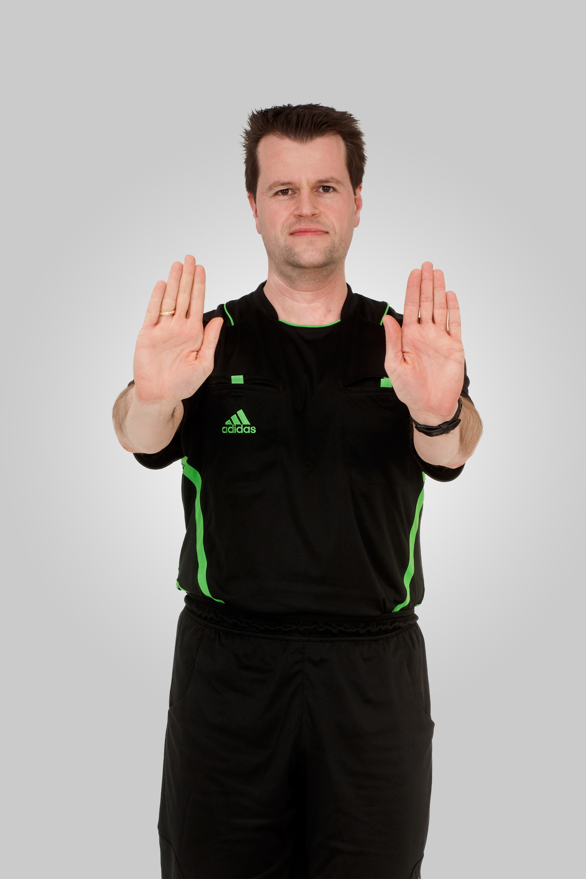 Internationale Handballregeln Handzeichen 10 Nichtbeachten des 3-Meter-Abstandes